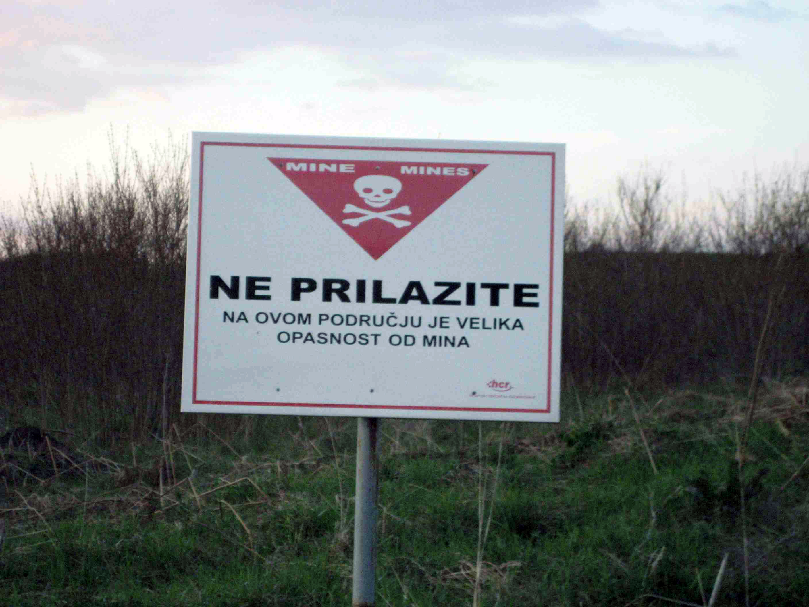 mina mine mines